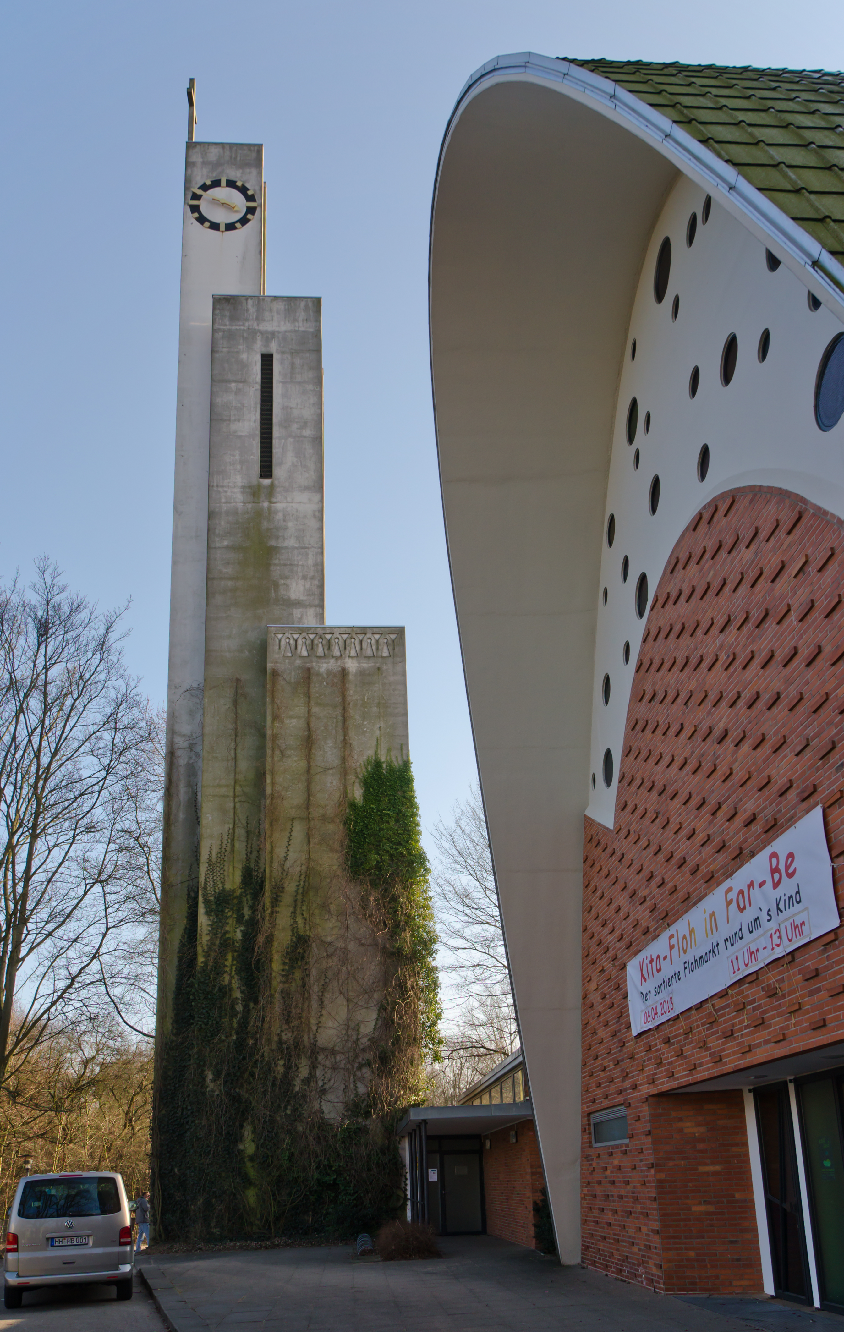 Erlöserkirche Turm von Norden